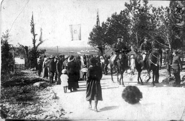 זאב ז'בוטינסקי וקולונל אליעזר מרגולין רכובים על סוסים במדי הגדודים העבריים.